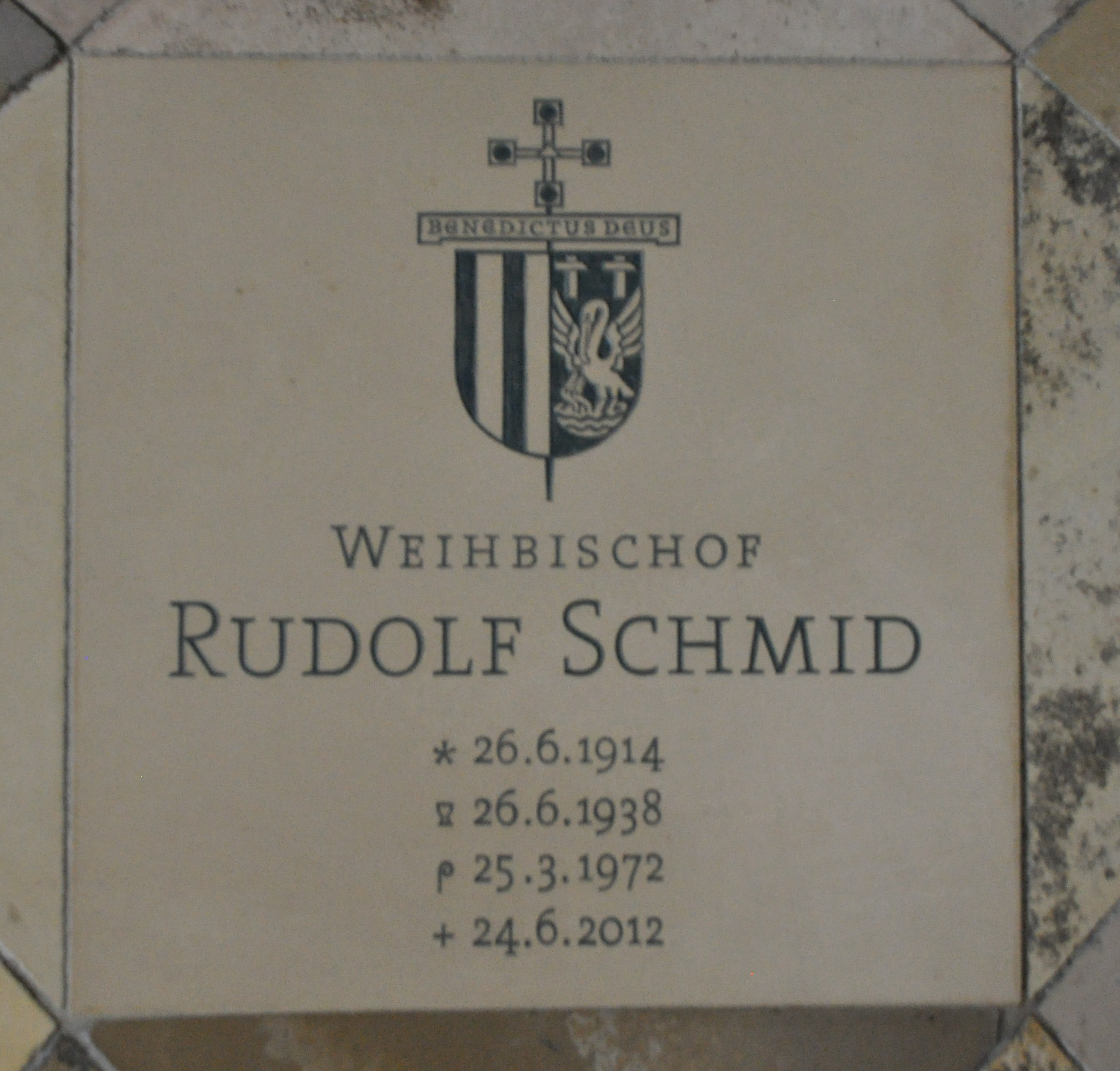 Augsburg, Dom, Grabplatte für Weihbischof Rudolf Schmid (1914–2012)